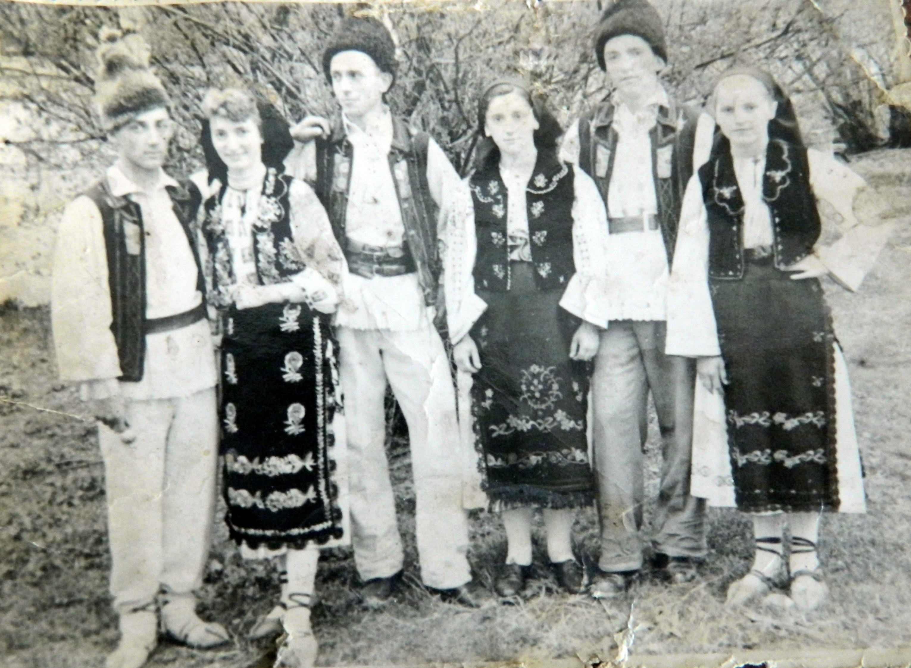 Dansatori din Luminișu ( Secatura ), ani '60, Nuțu, Victoria din Cluj, Teofil, Milica și Ionica din Deal, Victoria Alexandorului Petri lu' Ionaș.